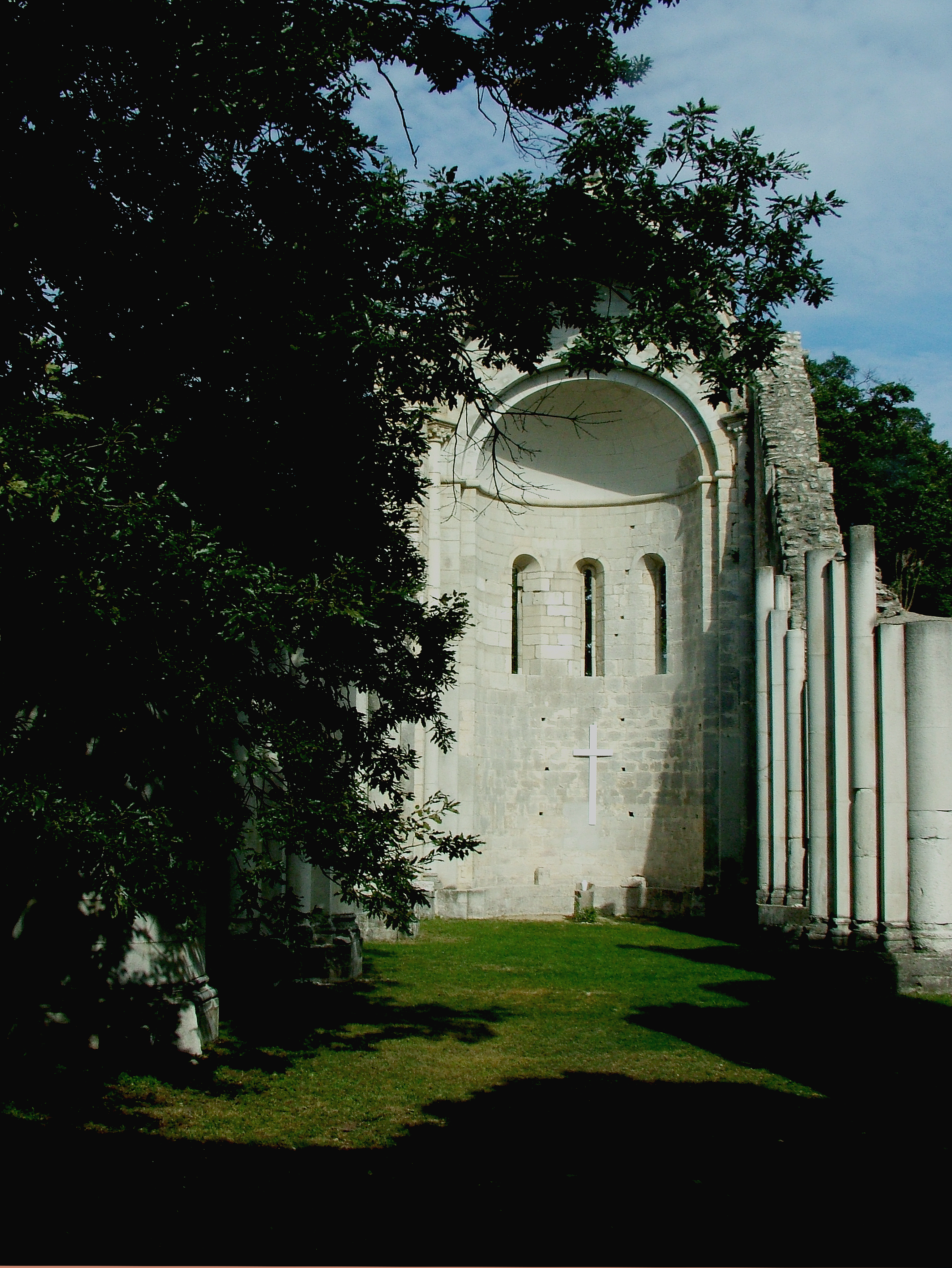 Vértesszentkereszti templomromok